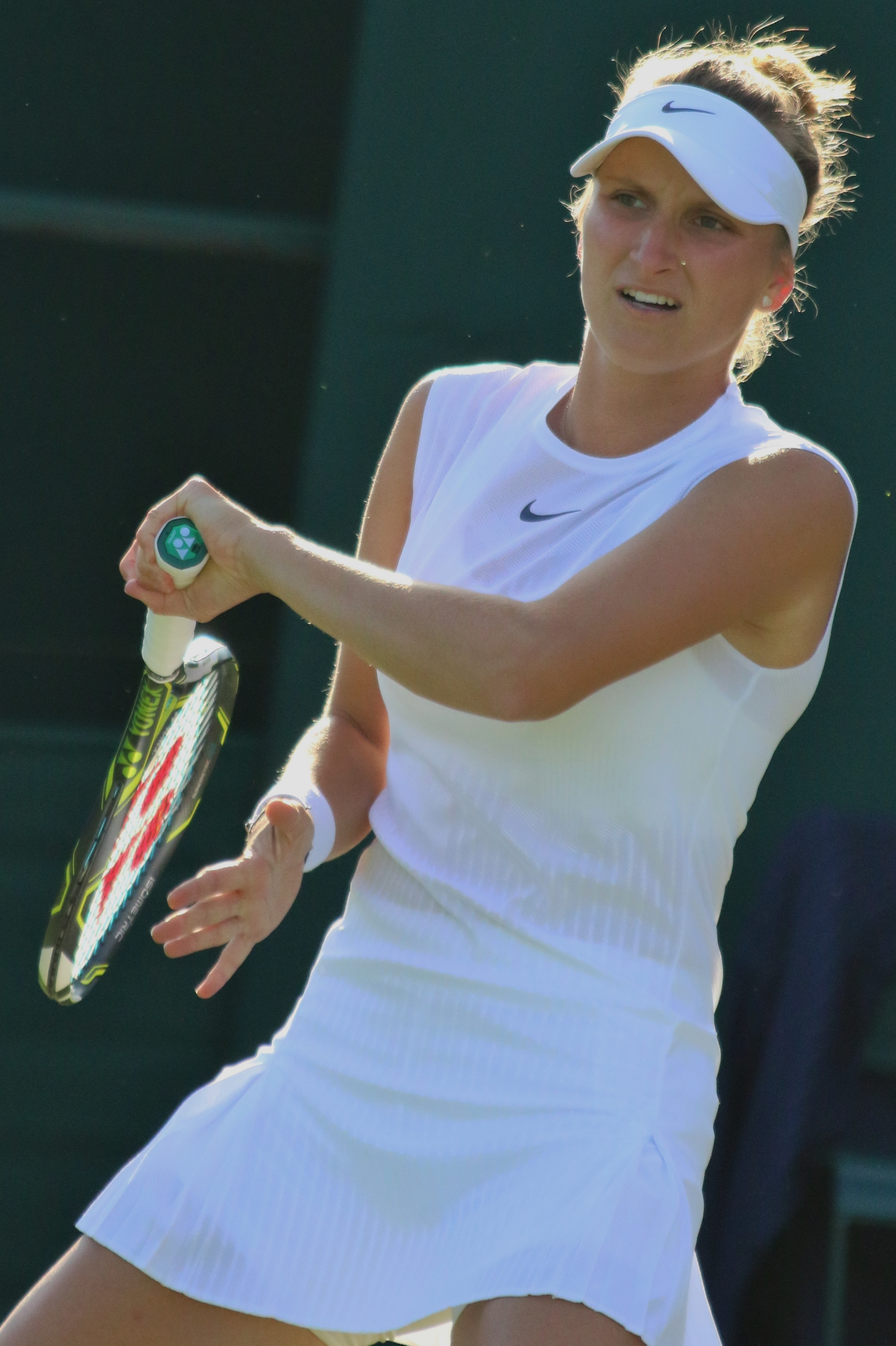 Vondrousova WM17 (8)